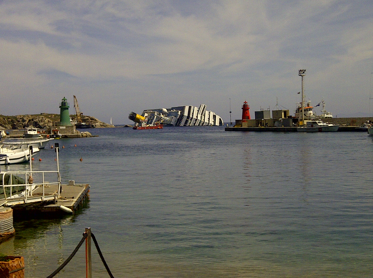 Costa Concordia, il naufragio